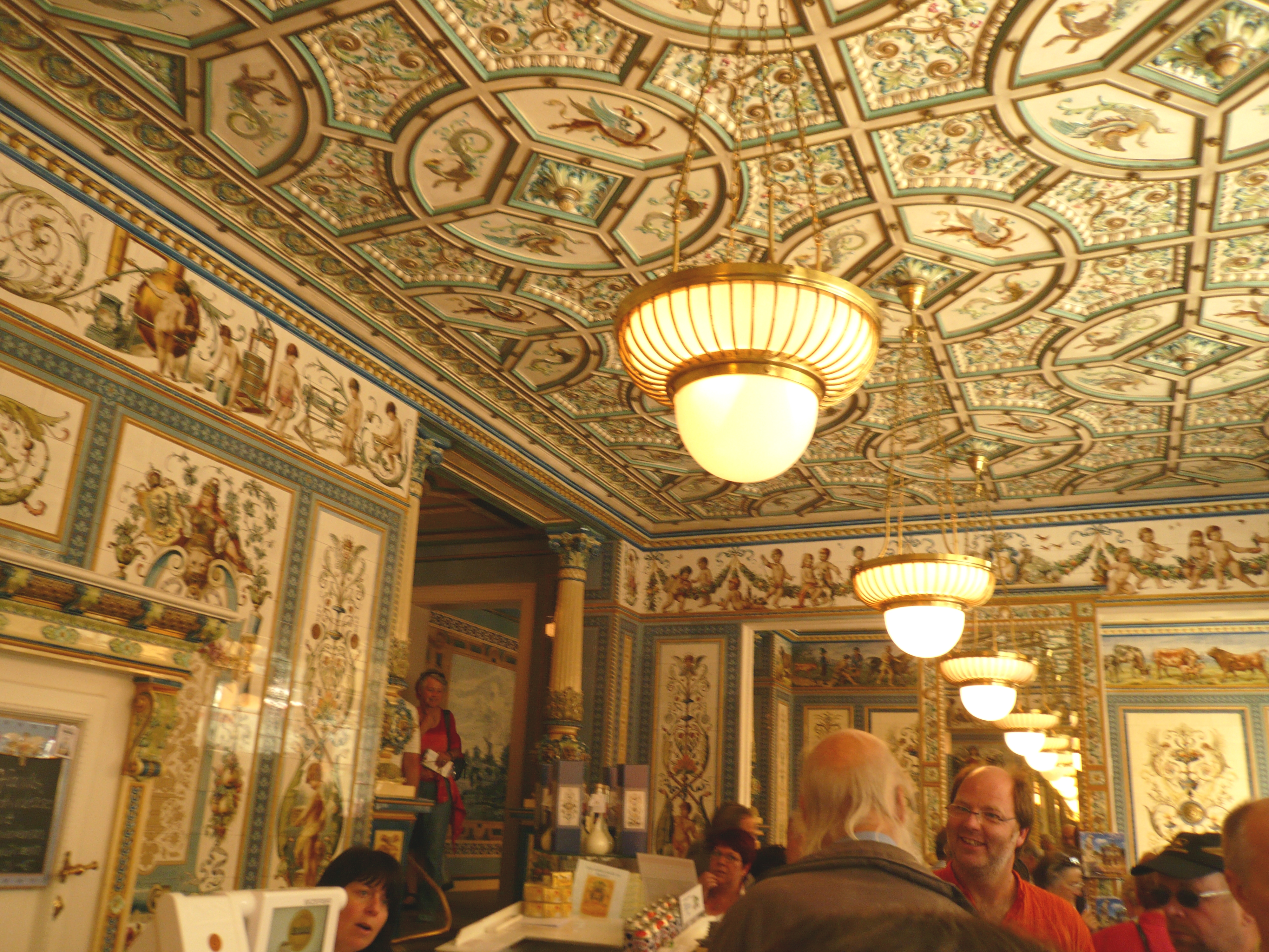 Das historische Milchgeschäft „Pfunds Molkerei“ in der Dresdner Neustadt.